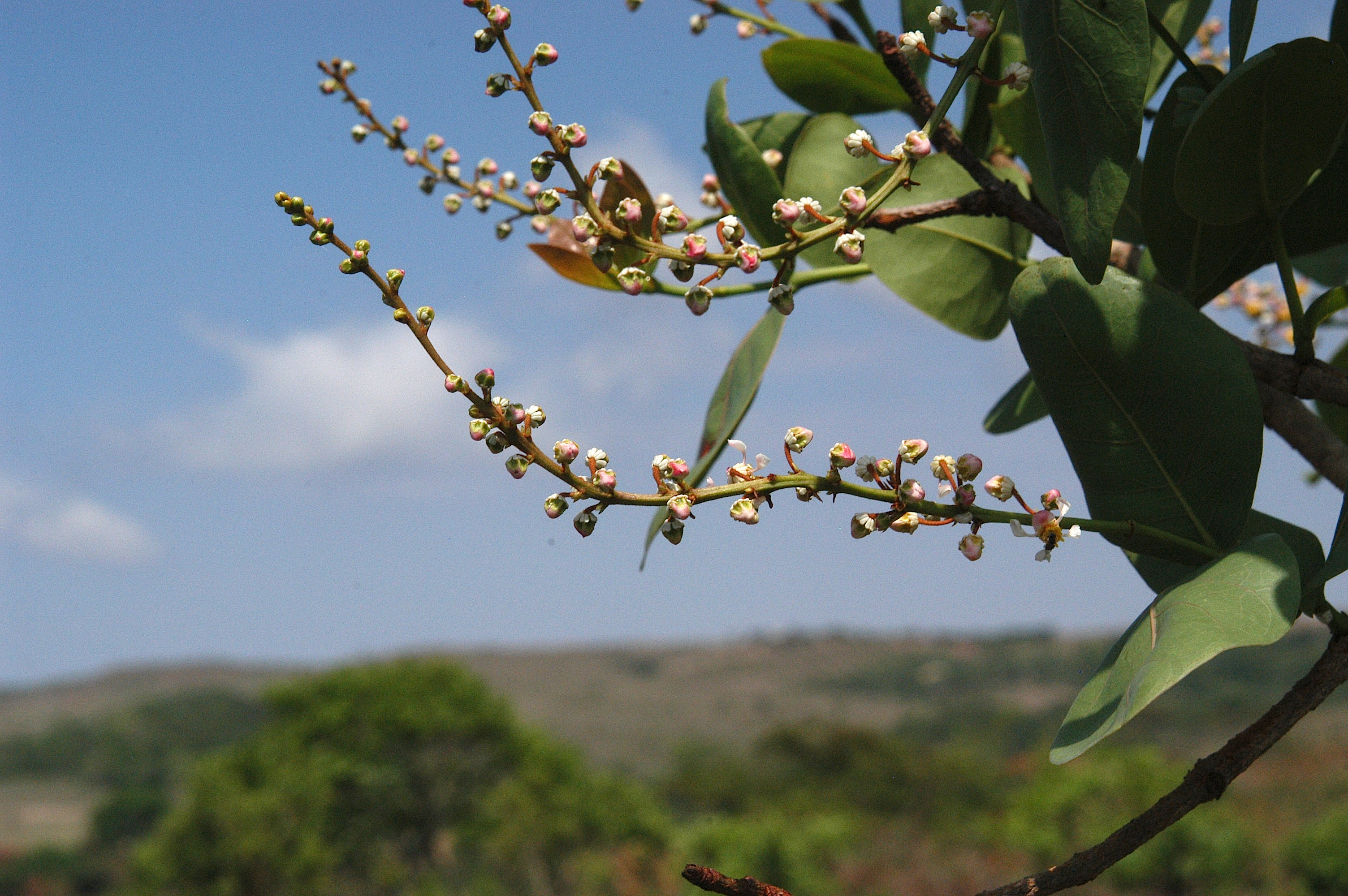 brotinho de árvore do cerrado em Núcleo Rural Sobradinho dos Melos.